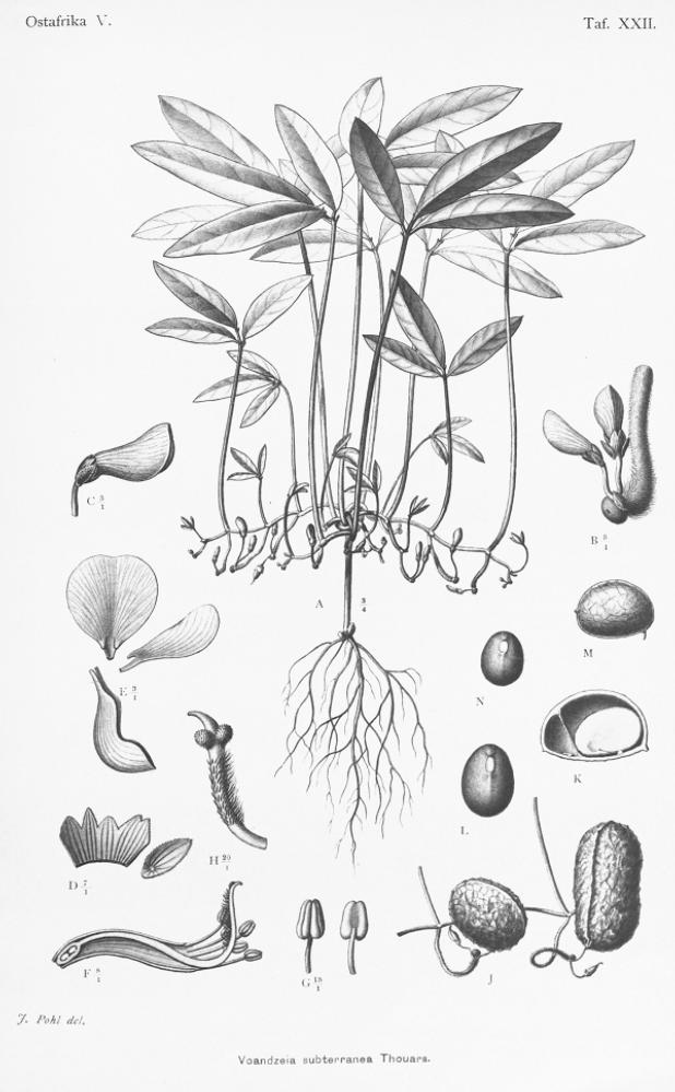 Illustration of Vigna subterranea (Orig. Voandzeia subterranea)